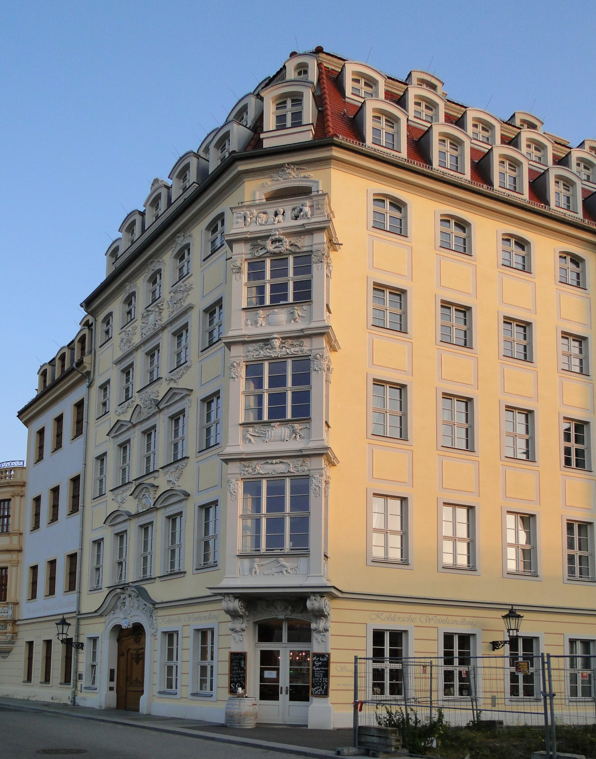 Das Haus befindet sich in Dresden in der Frauenstraße 14. Es wurde im Zusammenhang mit dem links anschließenden Heinrich-Schütz-Haus in der historischen Fassade und unter Einhaltung der Grundstücksgrenzen um 2010 wiederaufgebaut. Der Vorgängerbau wurde beim Luftangriff auf Dresden am 13. Februar 1945 total zerstört und die Ruinen wurden abgetragen. Im Rahmen des Wiederaufbaus der Dresdner Alstadt um die Frauenkirche am Neumarkt wurde das Gebäude als Leitbau wieder errichtet.